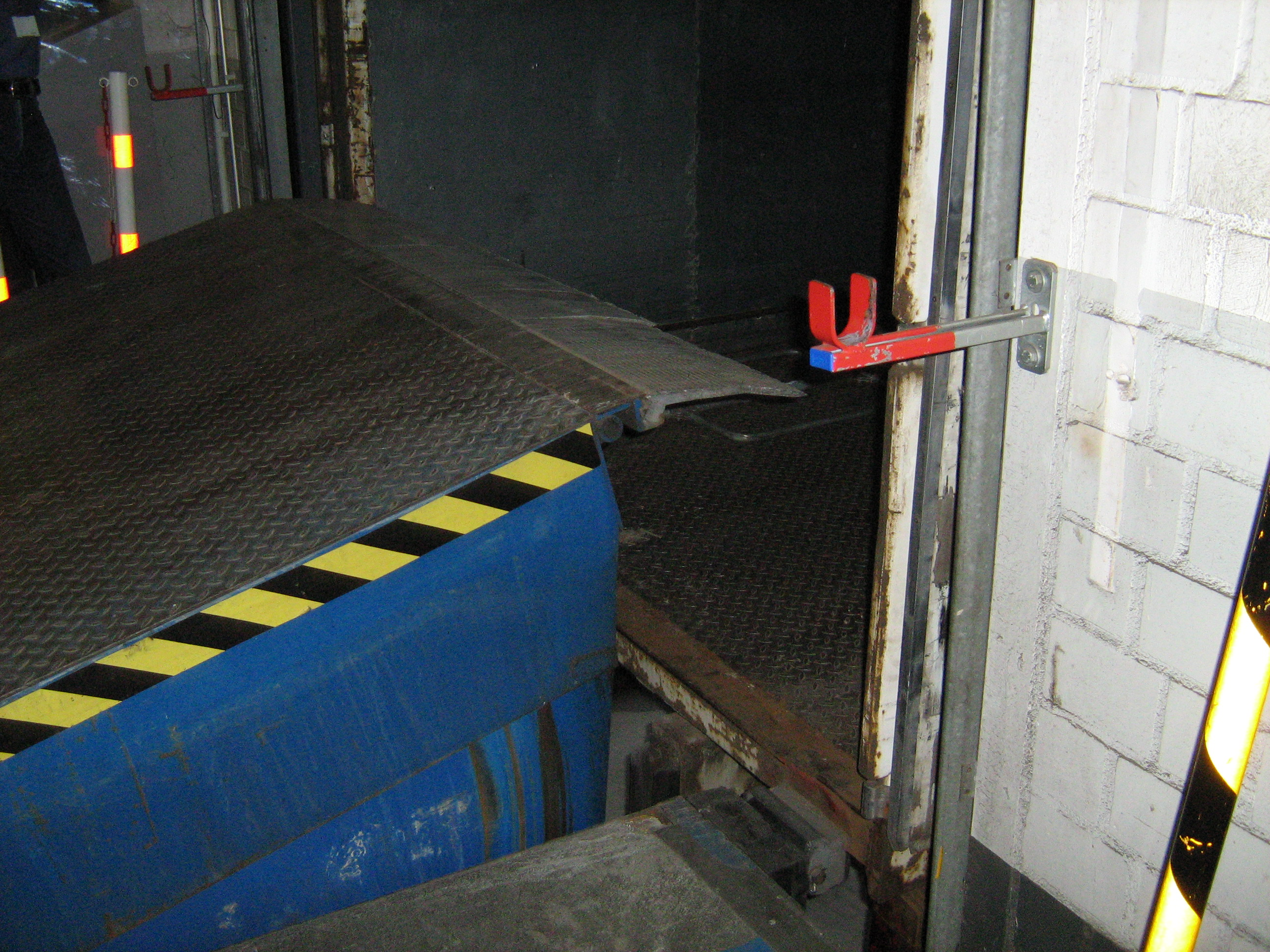 Überladebrücke beim hochklappen